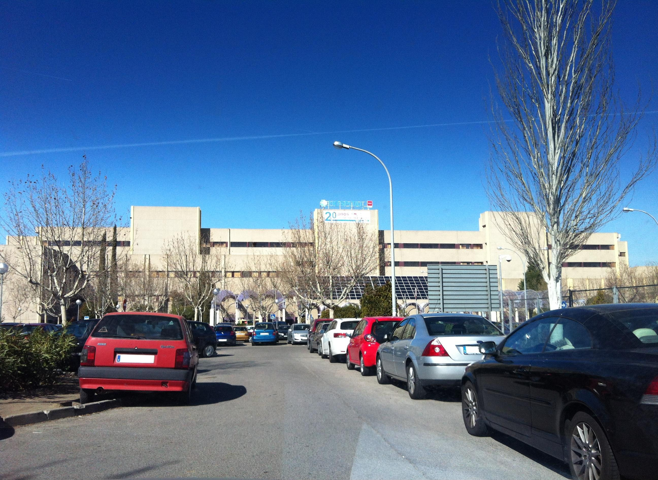 Vista exterior del hospital universitario público de Getafe. Fotografía de febrero de 2013